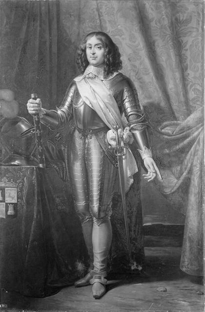 Philippe de la Mothe-Houdancourt, duc de Cardonne, vice-roi de Catalogne (1602-1657)